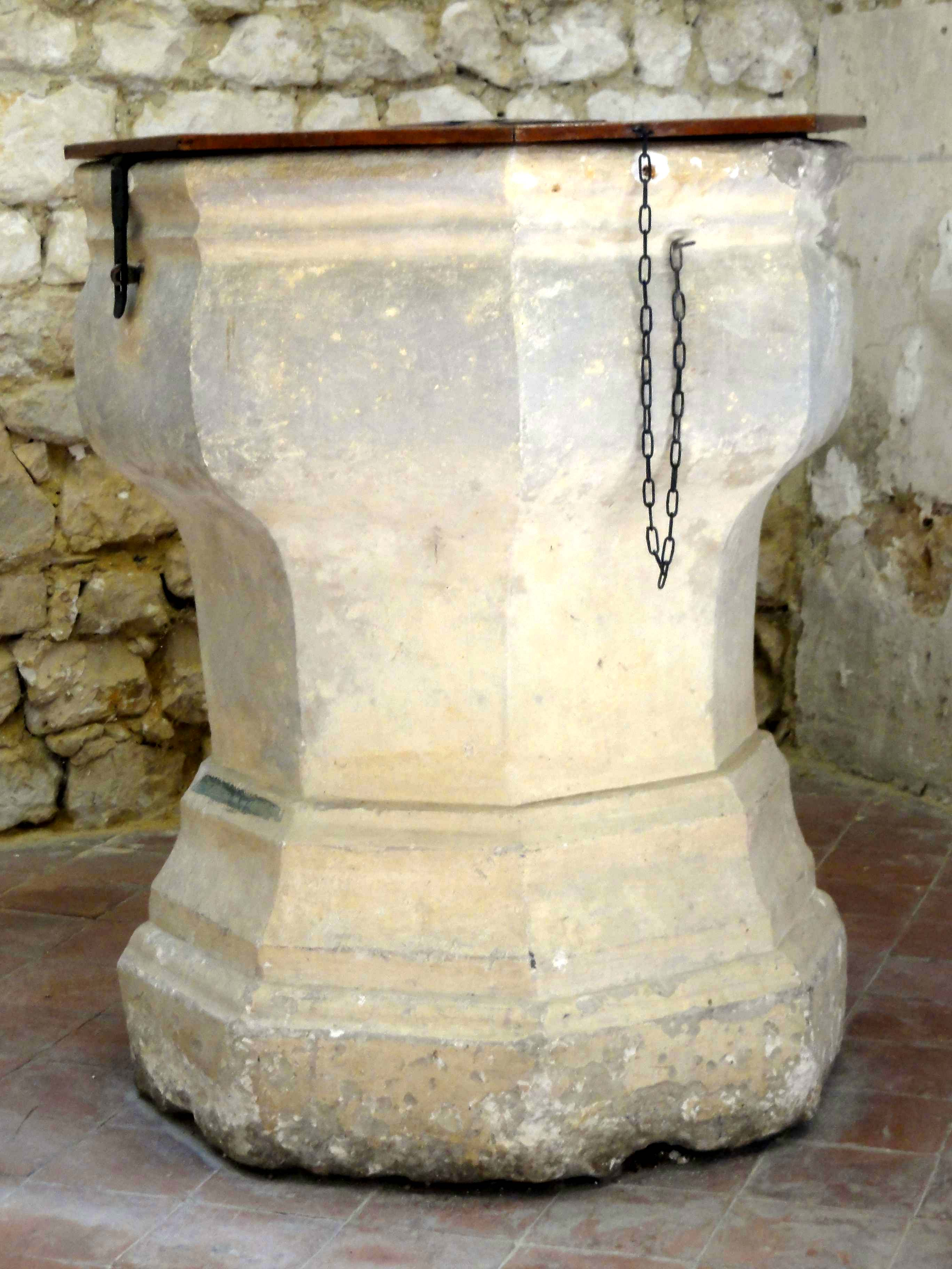 Fonts baptismaux.